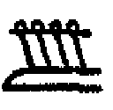 часть иероглифа имени Птолемея 3 Эвергета